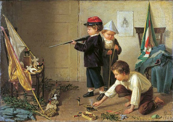 Bambini che giocano coi soldatini ispirati alle guerre risorgimentali e Garibaldi.